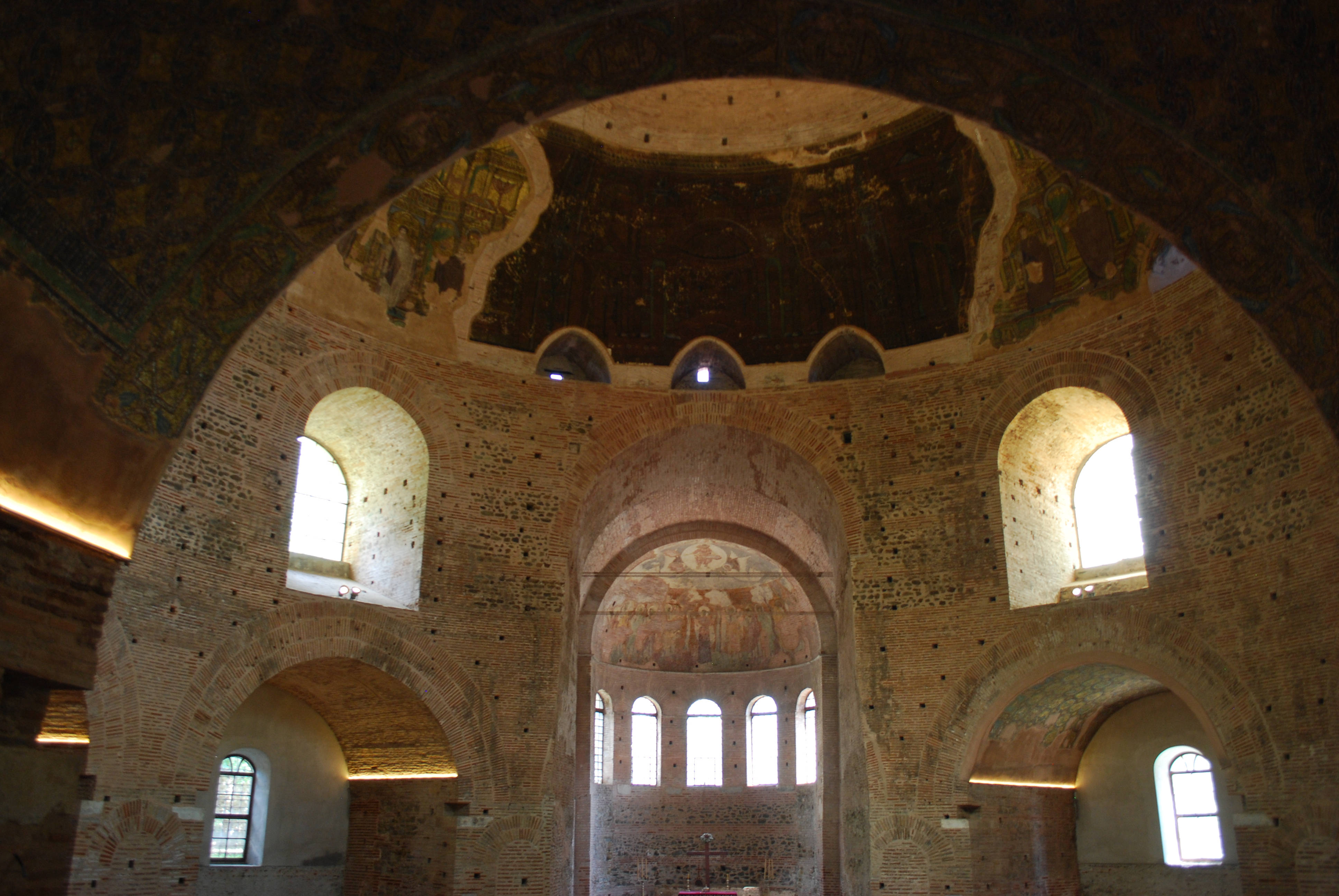 Vue de Thessalonique.